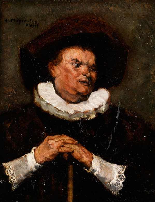 Öl auf Karton. 23 x 18,5 cm. Links oben signiert und ortsbezeichnet "D'dorf" (für Düsseldorf).